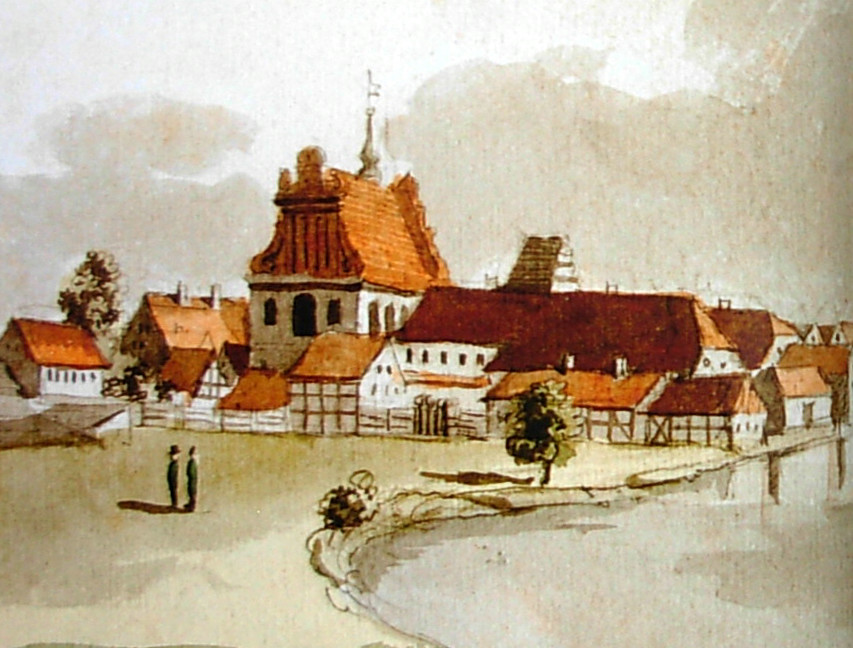 Nieistniejący kościół mariacki karmelitów w Bydgoszczy - jedyny wizerunek z ok. 1802 r.